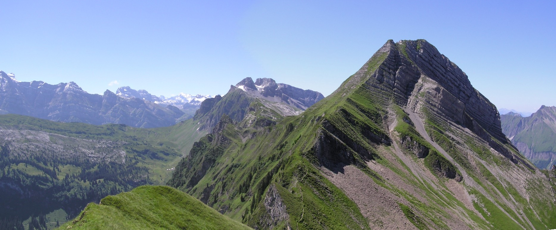 Zindlenspitz, vom Rossalpelispitz her photographiert